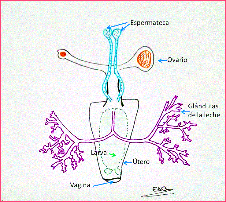 Adaptación de "Medical Entomology for Students, 2008. Mike Service".